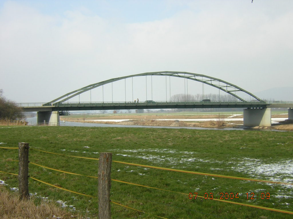 n.a.